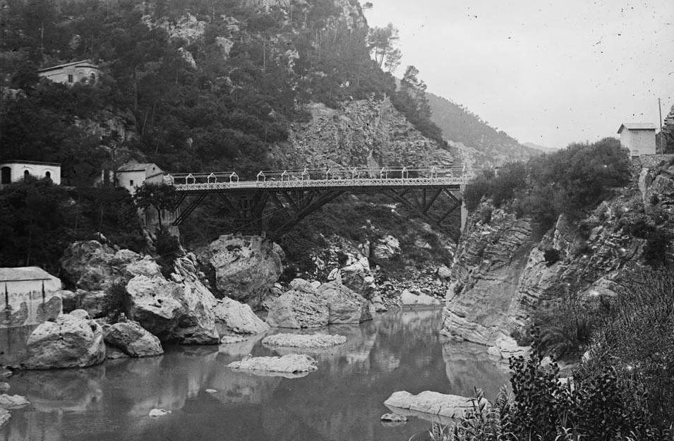 Imatge